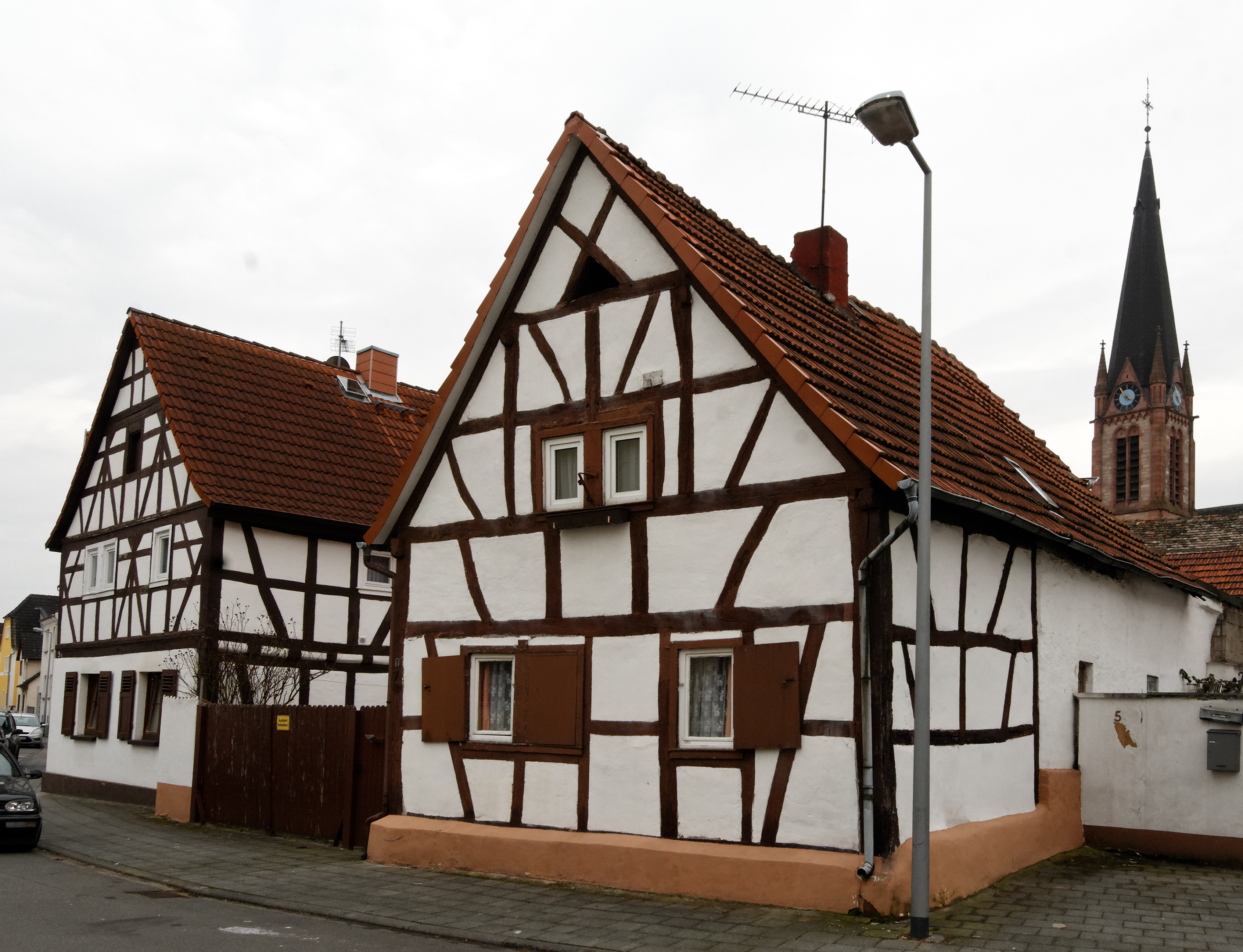 Fachwerkhäuser Dockendorffstraße 7 (rechts) und 9/11 (links) in Ober-Roden, einem Stadtteil von Rödermark. Im Hintergrund ist die Kirche St. Nazarius zu sehen. Das Ensemble vermittelt einen Eindruck des früheren Ortsbildes.